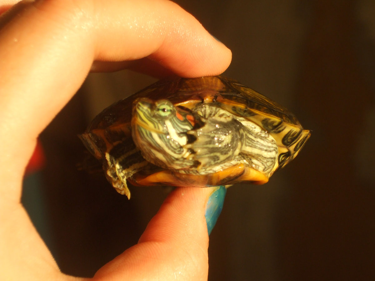 Trachemys scripta elegans